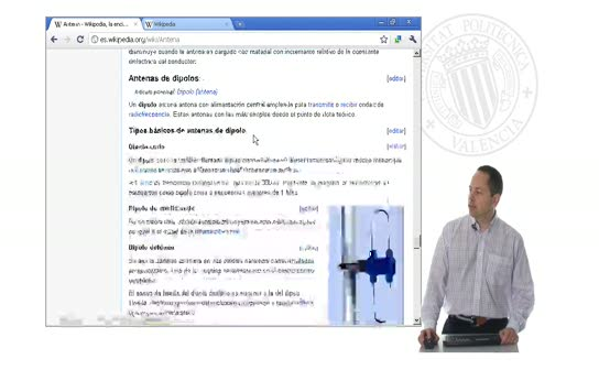 Ejemplo de captura de pantalla de una grabación Polimedia